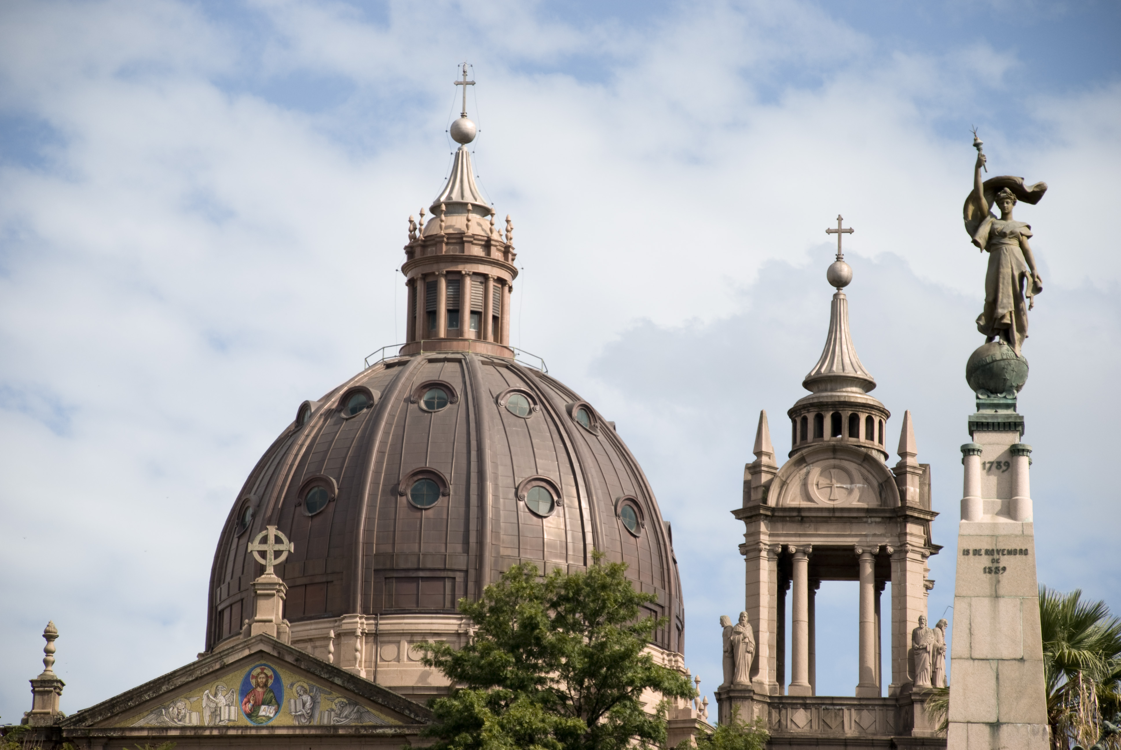 (Sentados a la mesa para el desayuno) -- ¿Dormiste bien? -- Claro. Aunque tuve un sueño extraño... -- Bueno, cuéntame